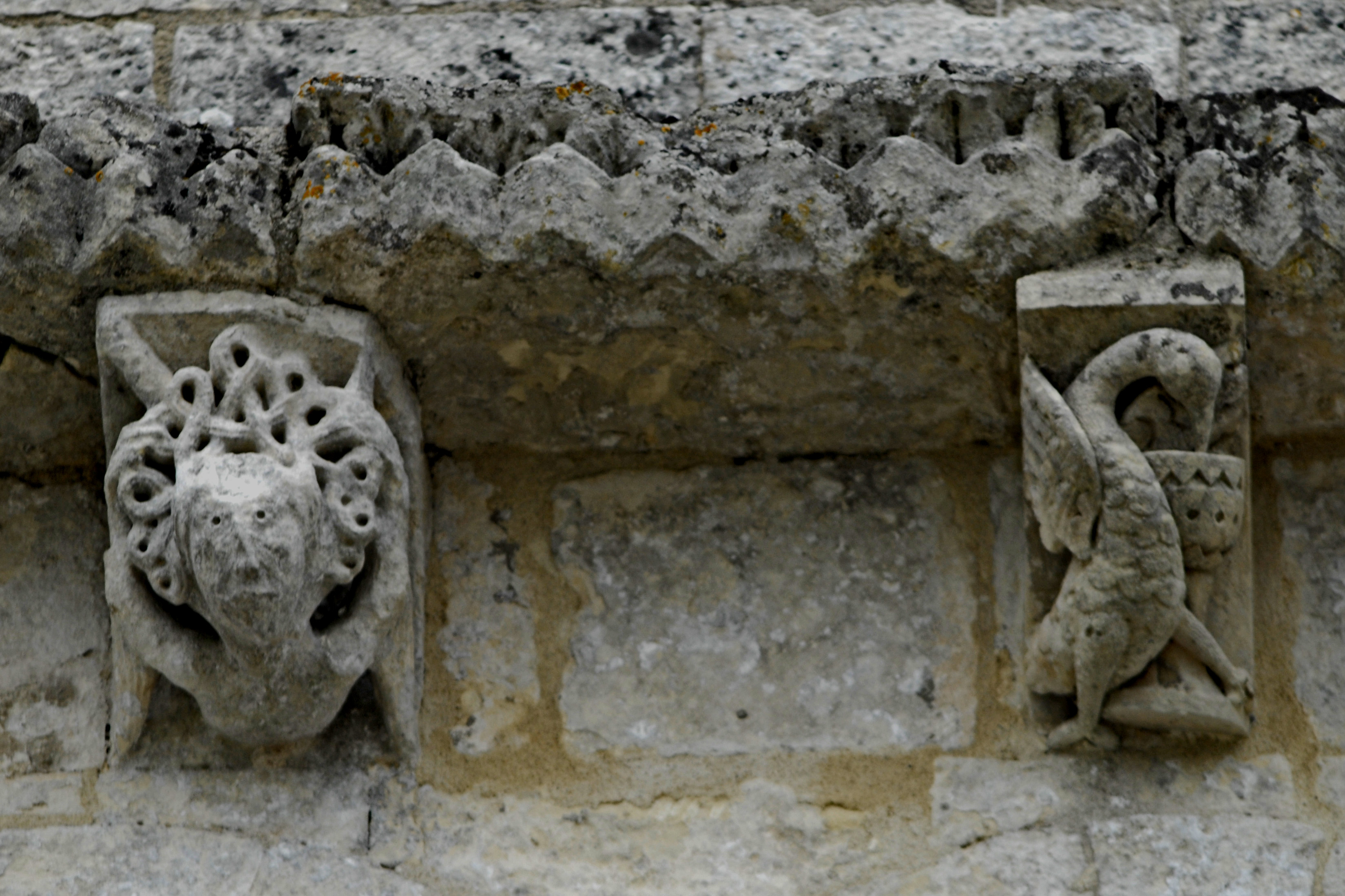 Notre-Dame Corme-Écluse,Kragsteine Nr. 5+6